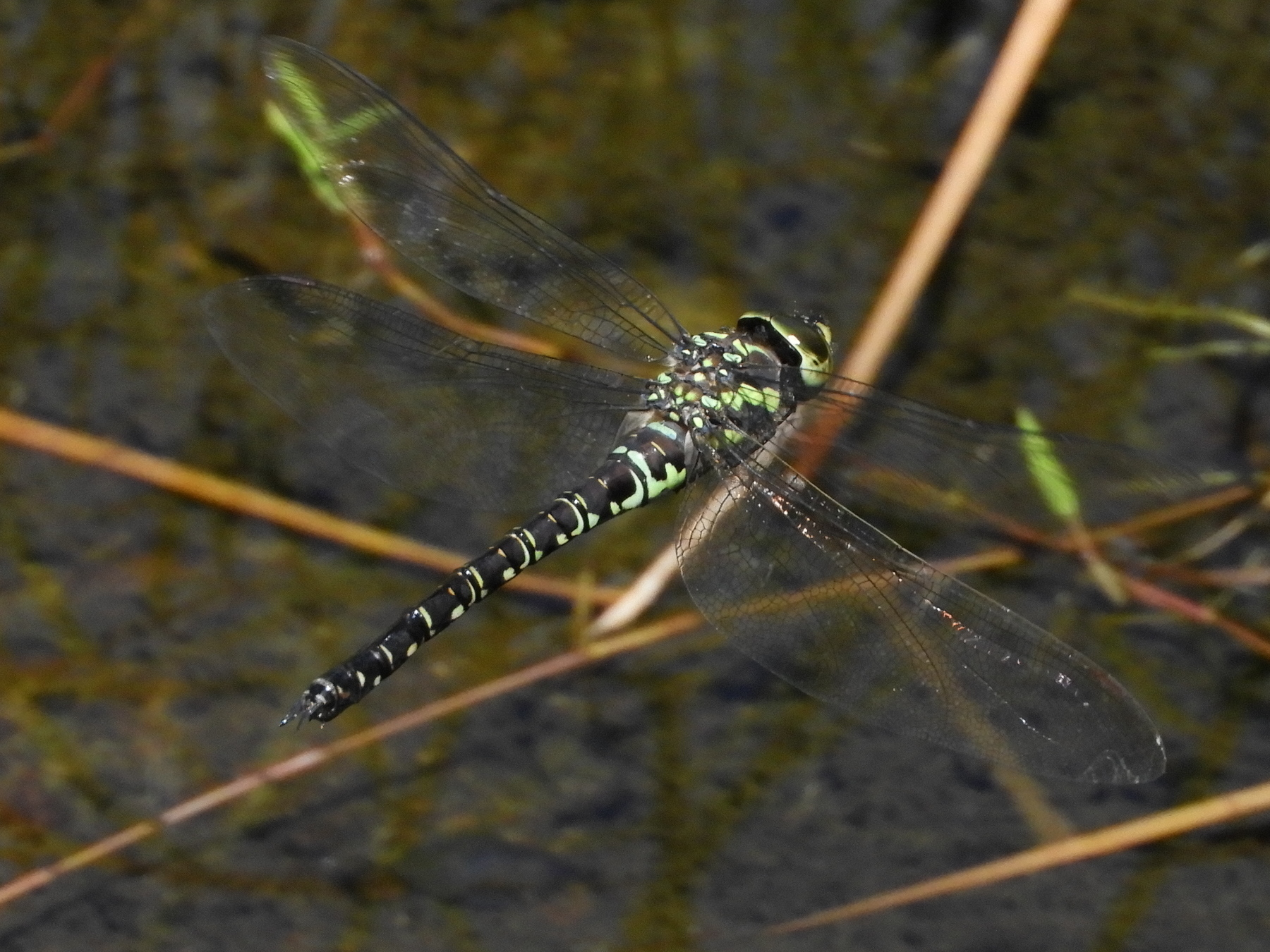 オオルリボシヤンマ雌 広島県